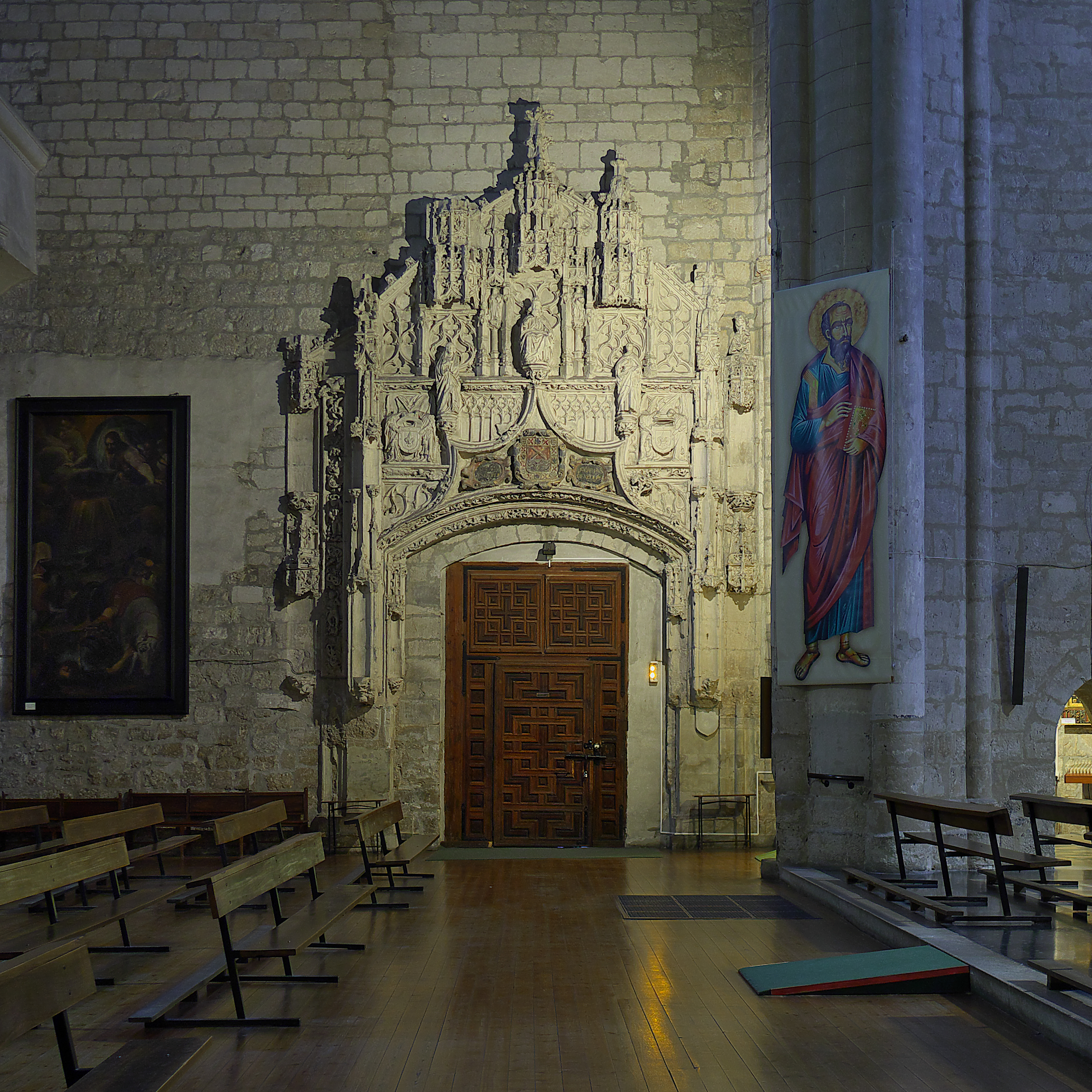 Portada situada en el extremo norte del transepto. Portada que comunicaba la iglesia con el claustro conventual, destruído por la francesada en 1809.